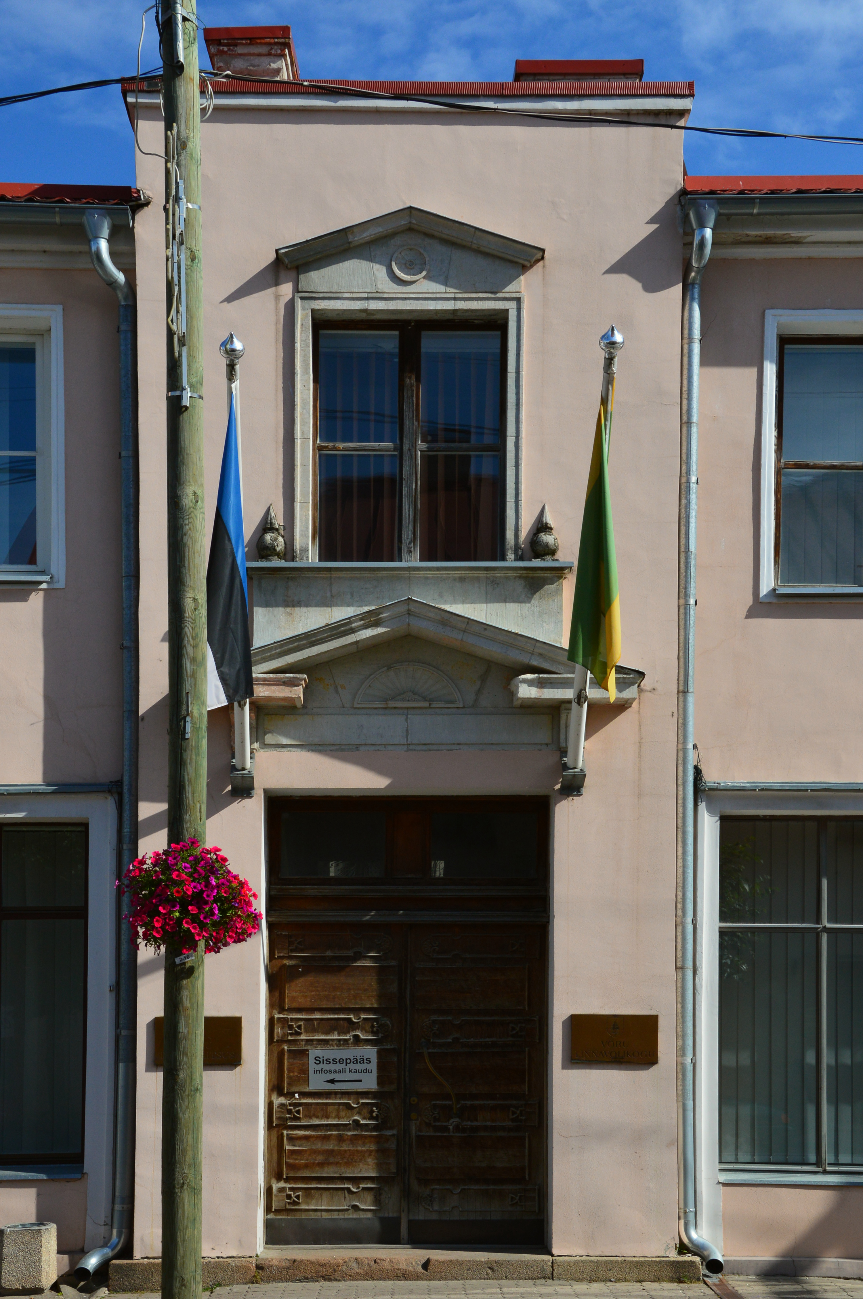 Võru linnavalituse hoone sissepääs.